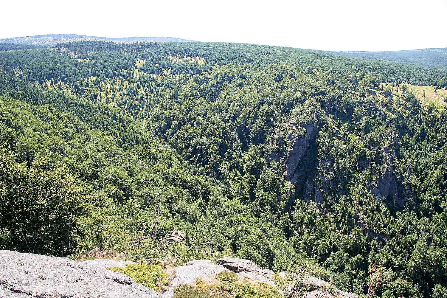 Frýdlantské cimbuří - pohled z vyhlídky do údolí Černého potoka, Jizera Mountains, district Liberec, Czech Republic Autor: Prazak date: 19. 7. 2006